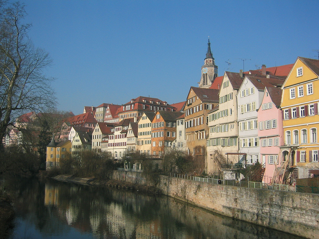 Tübingen, Germany: Neckarfront